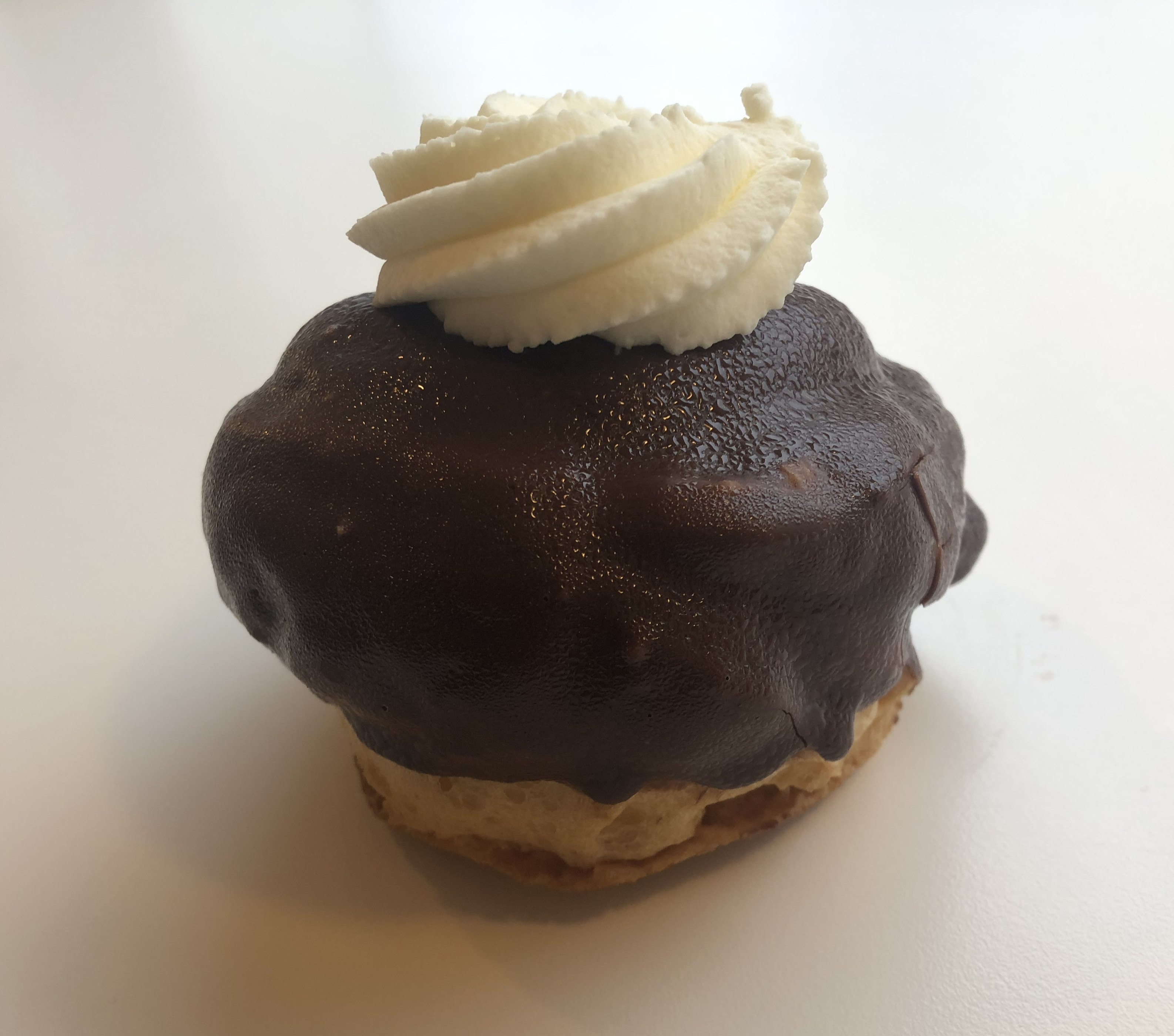 Moorkop van de Hema-bakkerij in februari 2020